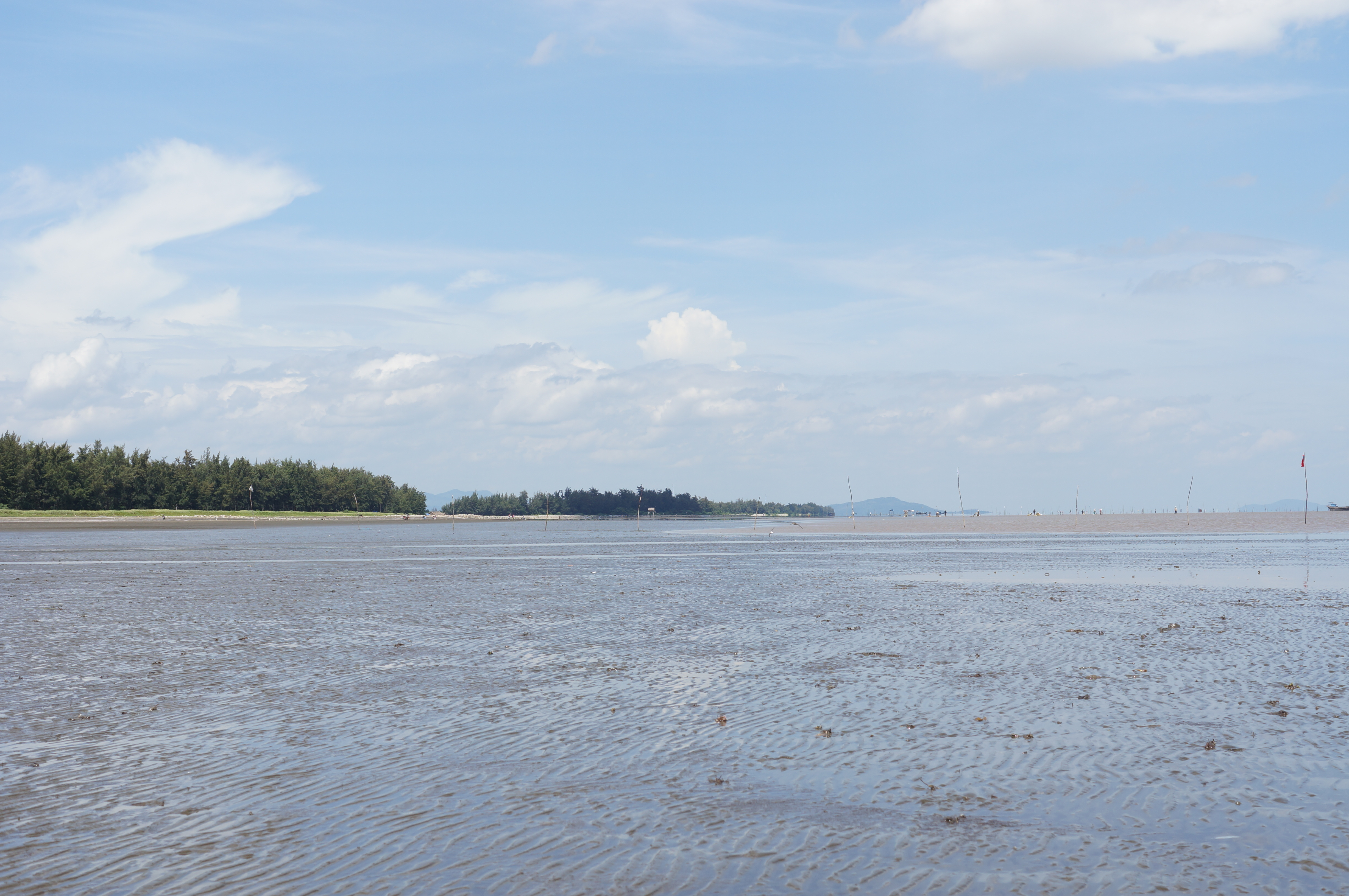 Bãi biển Cần Giờ nhìn từ Khu du lịch 30/4